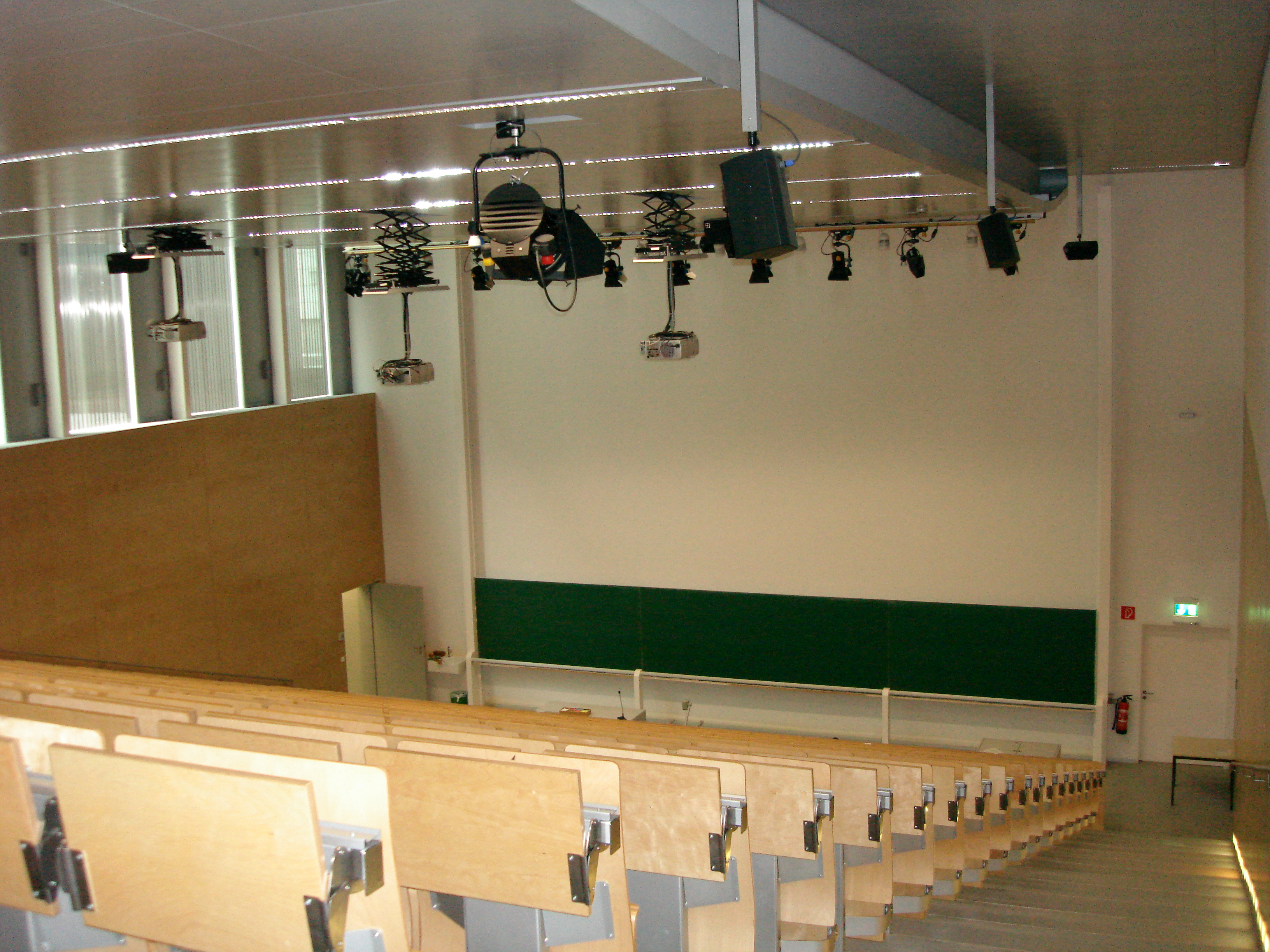 Hörsaal V38.01, Universität Stuttgart, Vaihingen date: 03.02.2006 by: Christoph Hoffmann